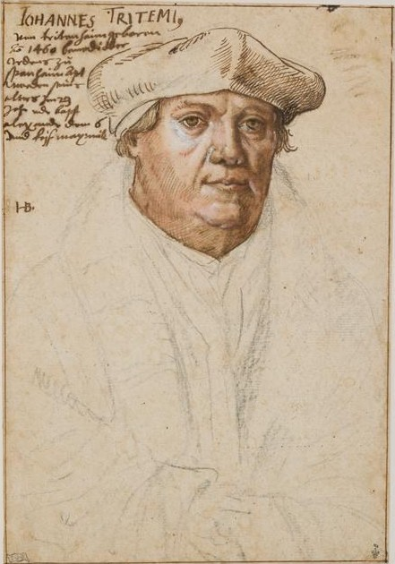 Portrait von Johannes Trithemius. 26,5 x 18,4 cm. Original: Chantilly, musée Condé